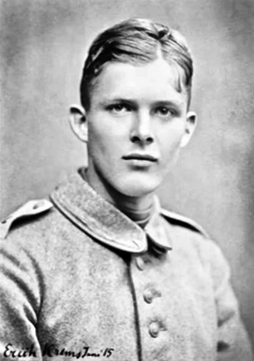 Erich Krems (1898–1916) als Soldat während des Ersten Weltkrieges